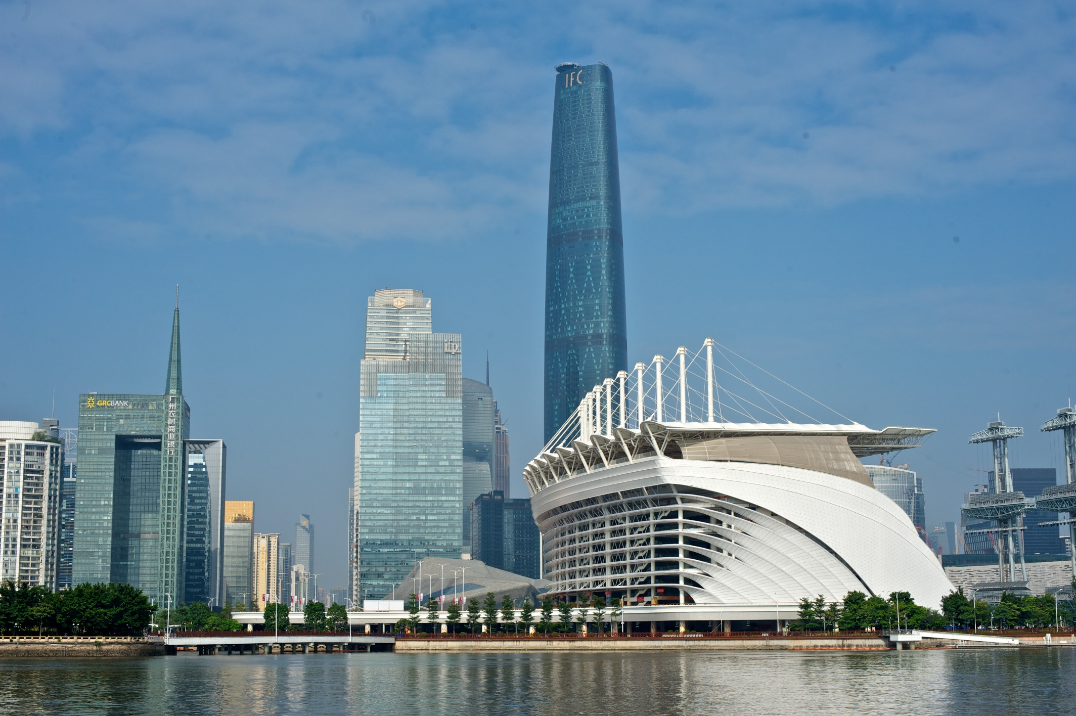 KAM_6695